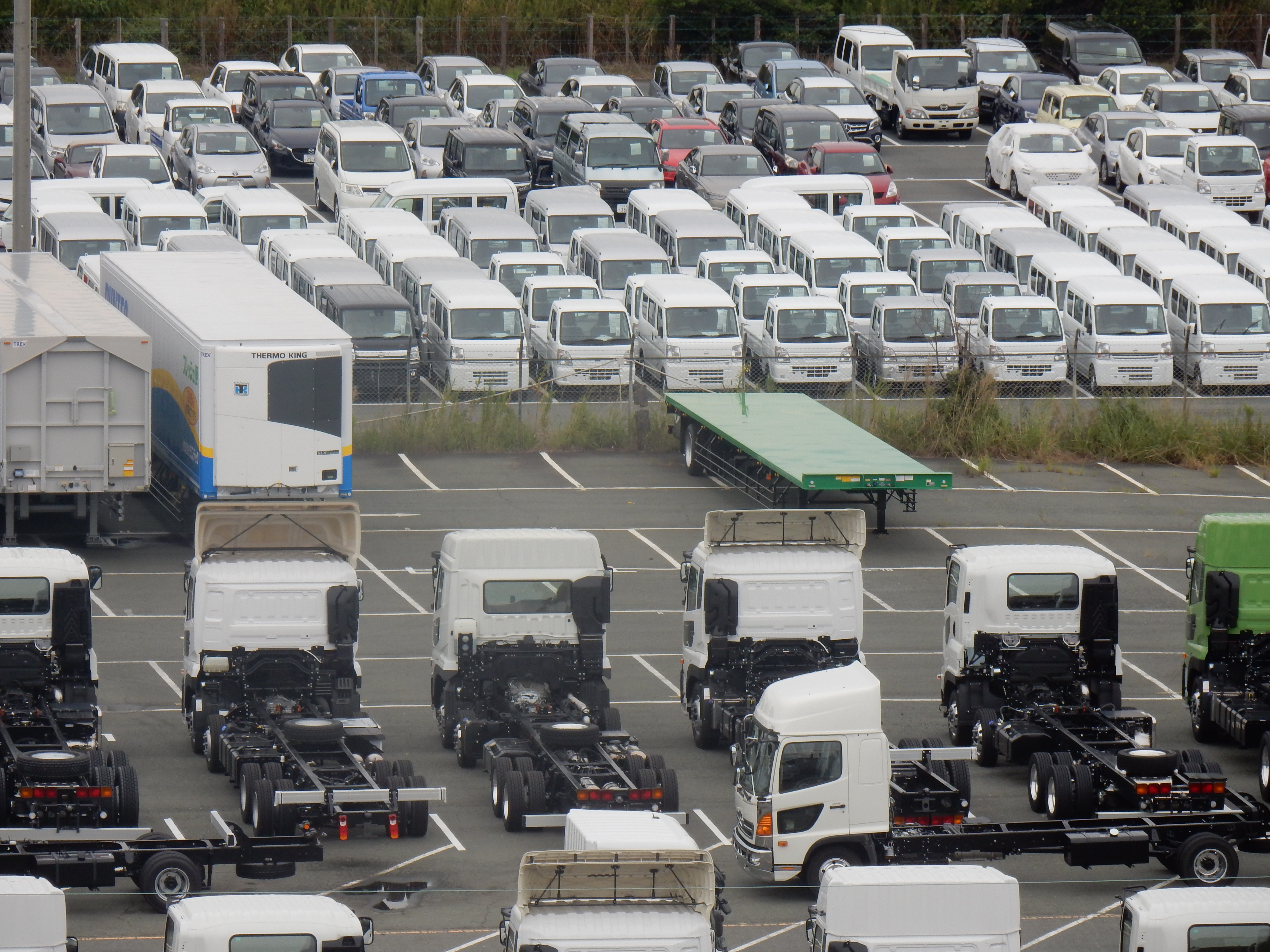 motor pool in Japan